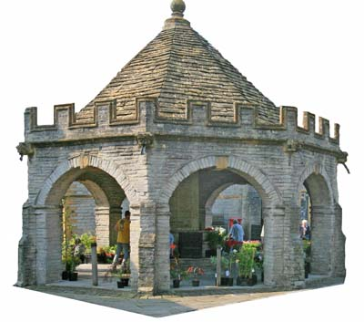 Butter cross